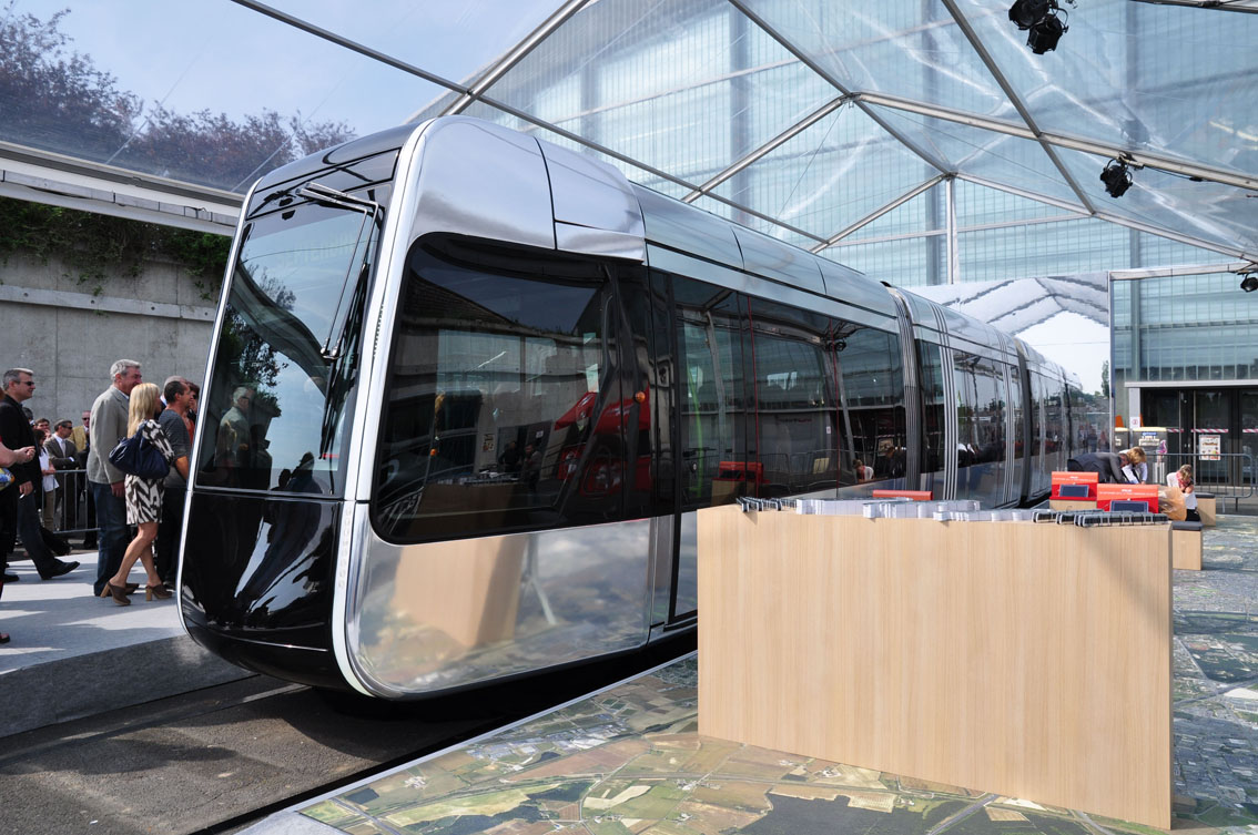 Vue extérieure de la maquette du tramway de Tours présentée lors de la foire exposition de Tours 2011.